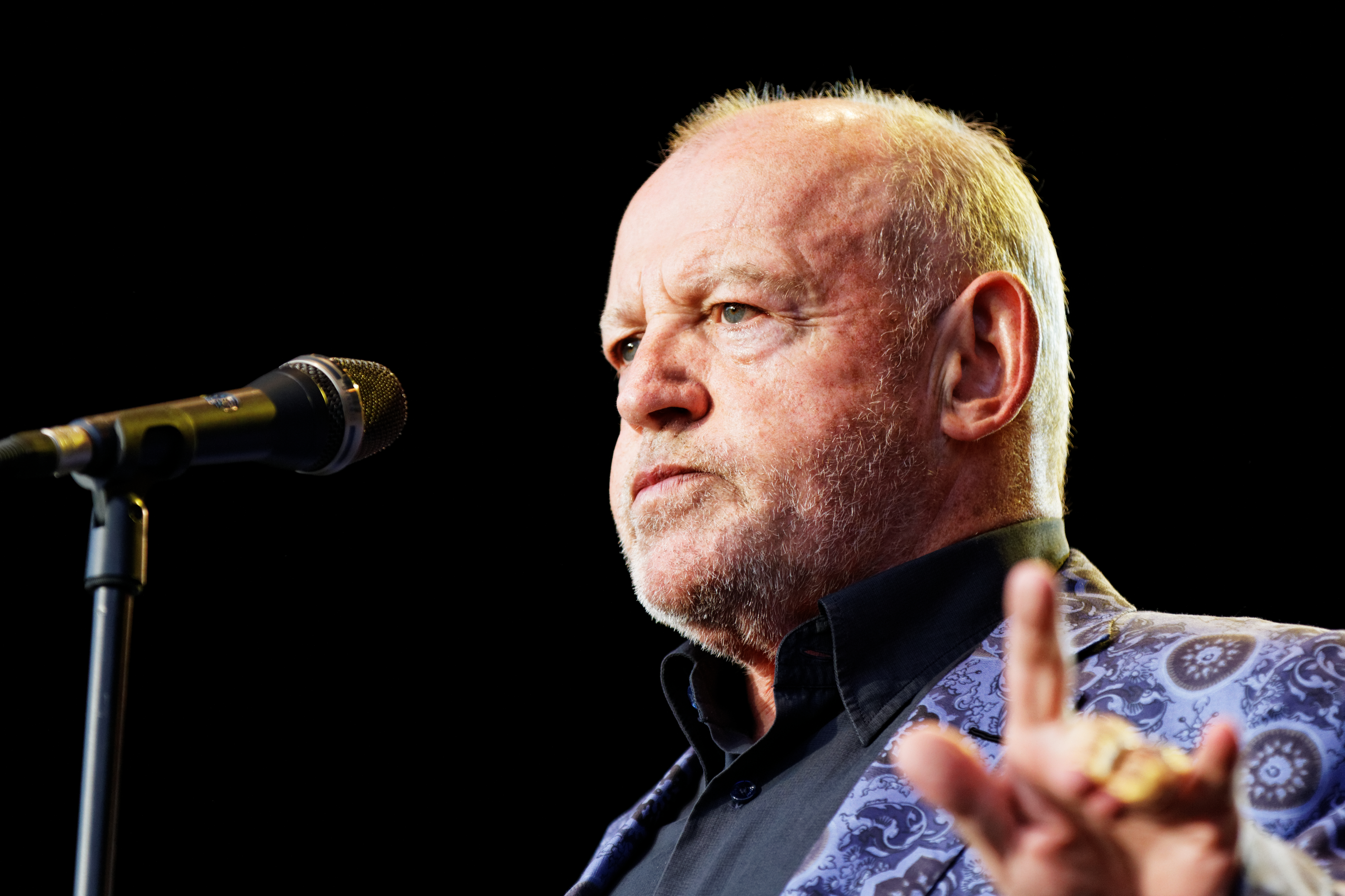 Joe Cocker en concert sur la scène Landaoudec lors du festival du bout du Monde à Crozon dans le Finistère (France).